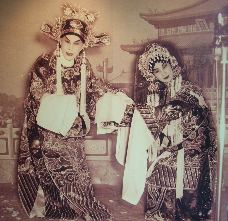 2006年2月28日至6月30日香港中文大學中國音樂資料館藏品展 之 任劍輝 白雪仙 「仙鳳鳴劇團」